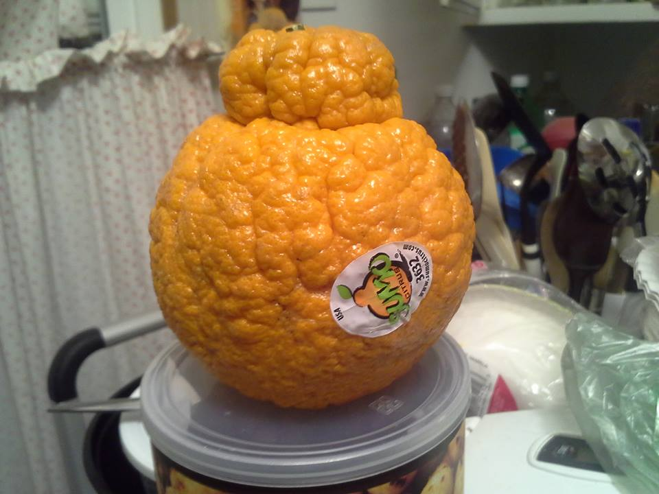 Usona dekopono (citrusa frukto)